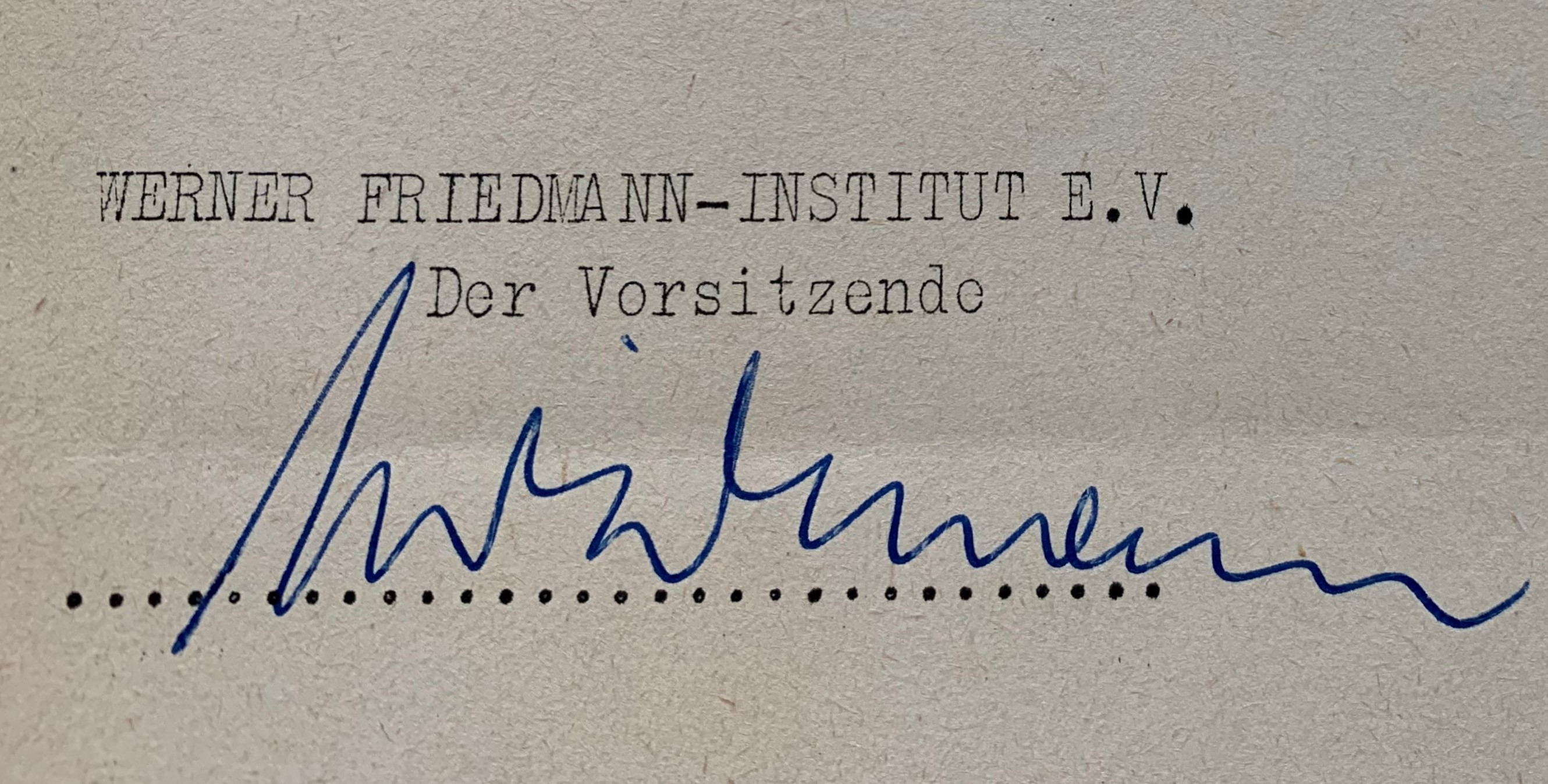 Eigenhändige Unterschrift Werner Friedmann